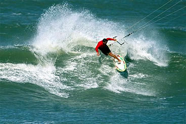 Kitesurfer / Kite Wave / praia da ibiraquera